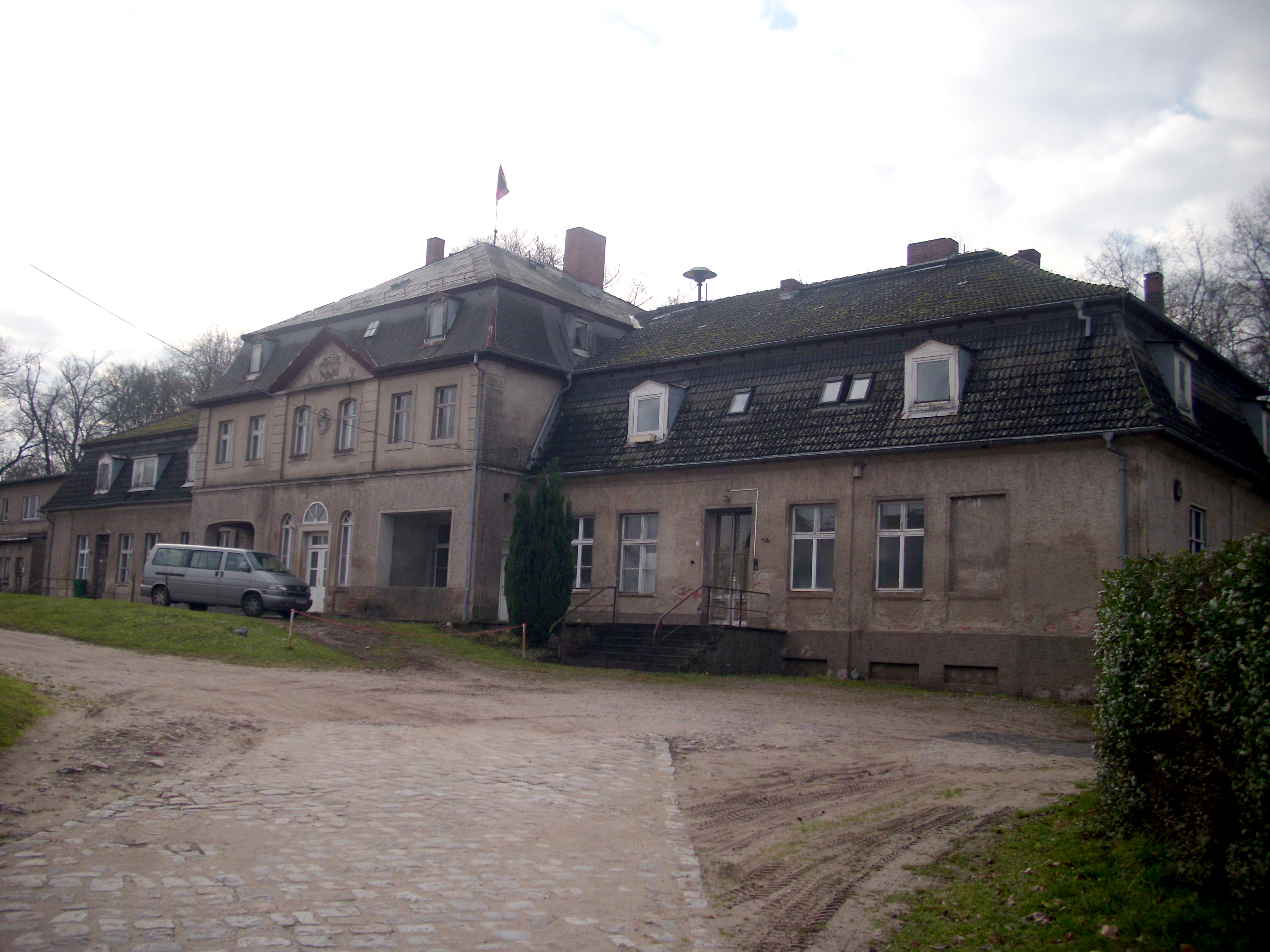 Gutsschloss, Ihlow, Oberbarnim, Brandenburg, Märkische Schweiz